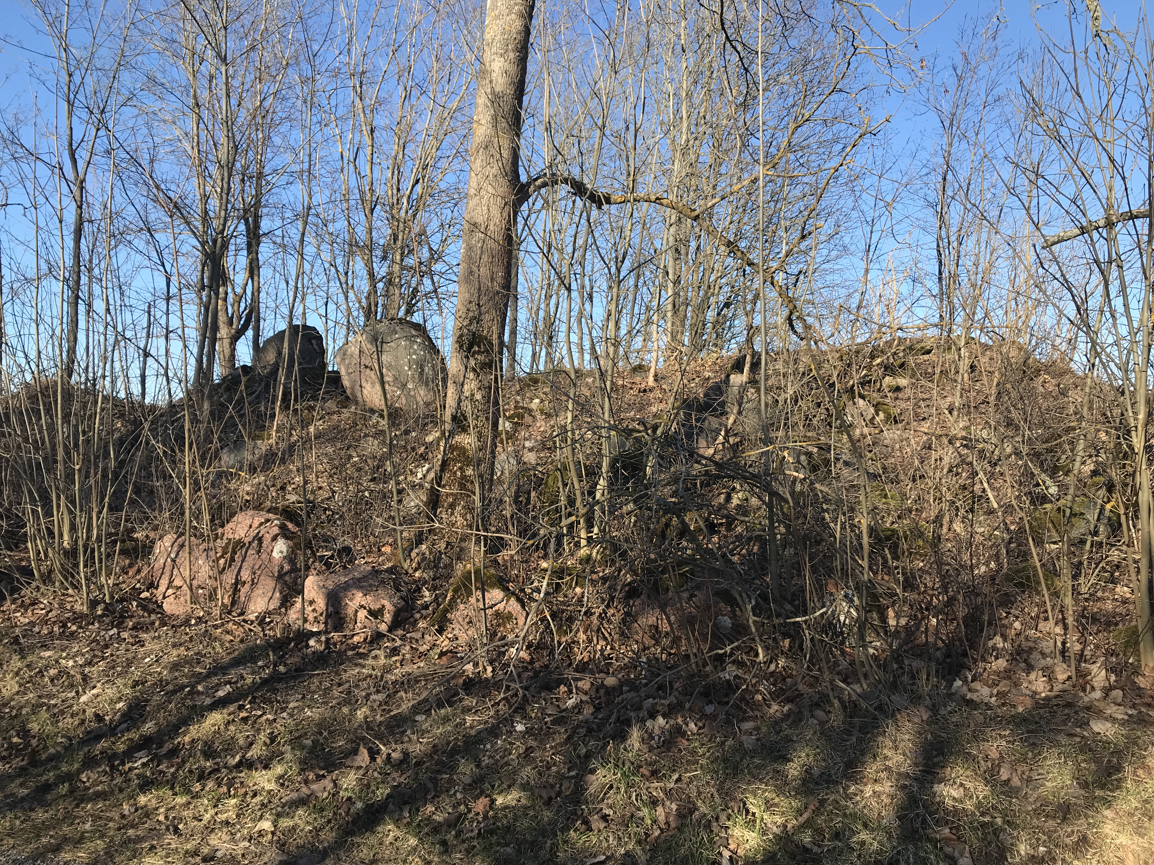 Pildil on näha kihelkonnakoolist järele jäänud kivihunnik